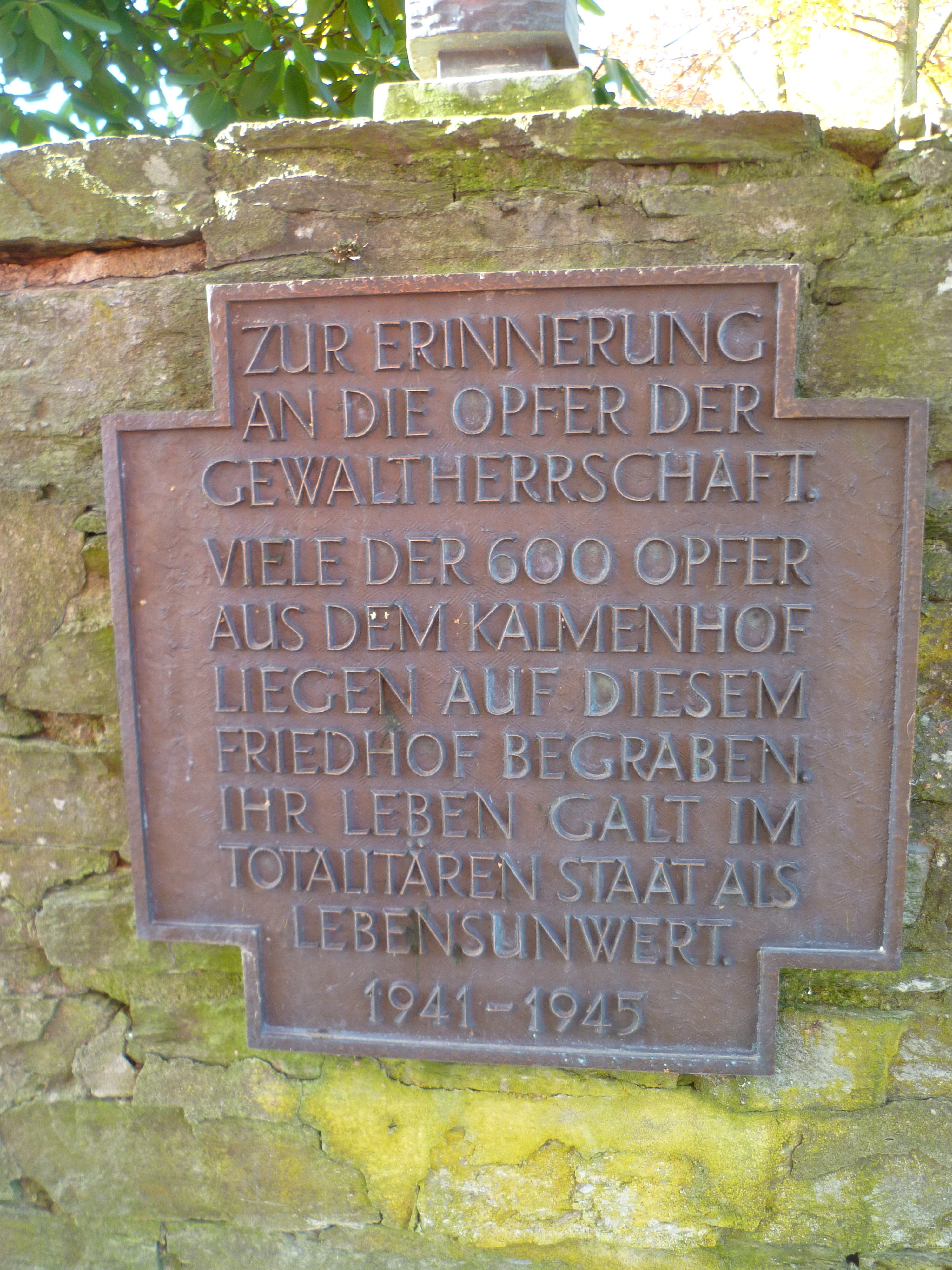 Gedenktafel zu den Euthanasieopfern des Kalmenhofs am Idsteiner Friedhof